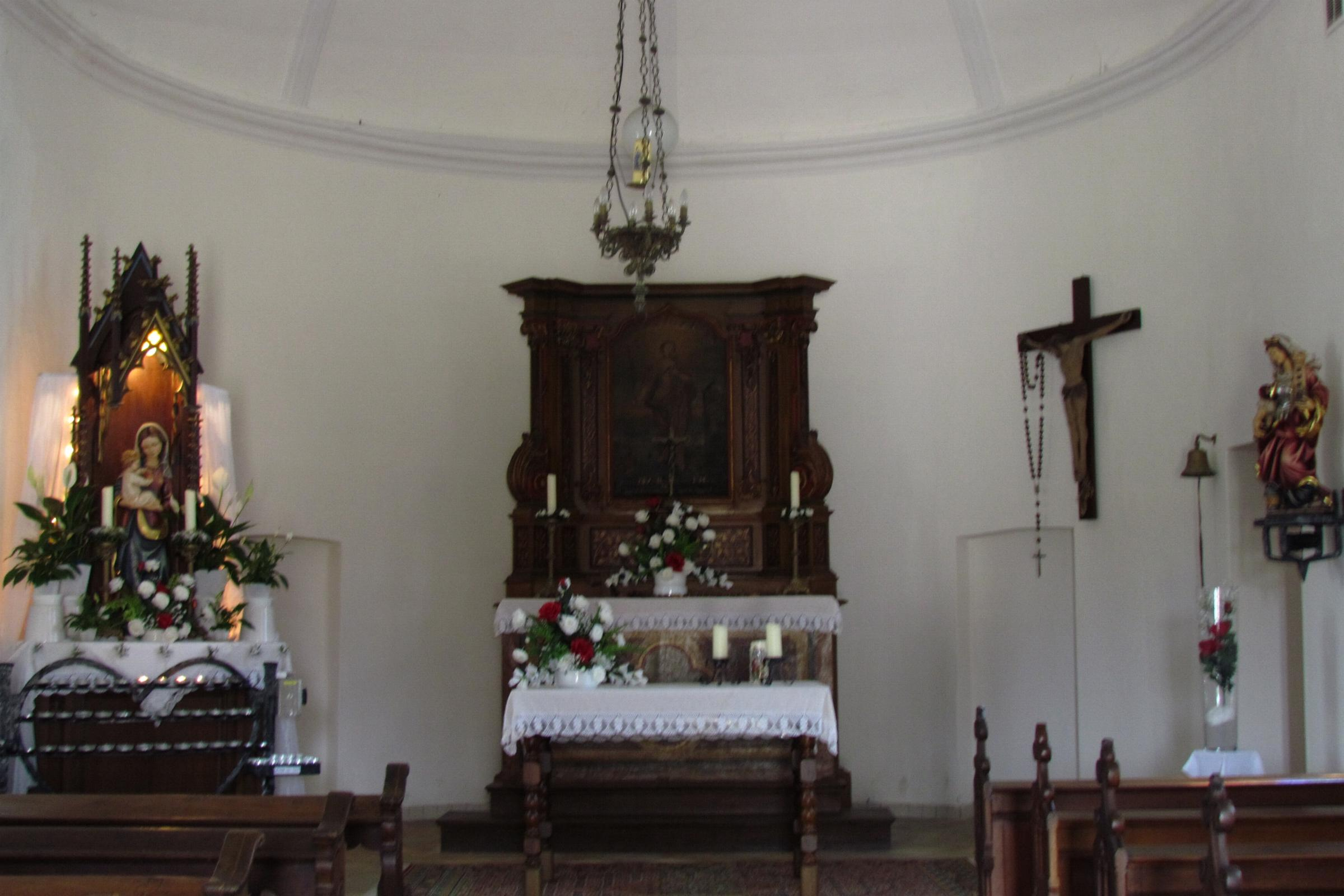 Schalbruch Barbarakapelle Innen